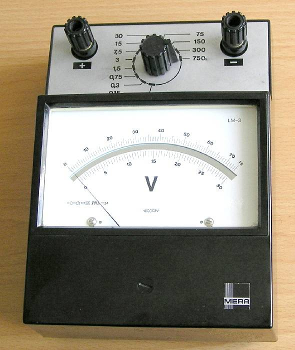 Woltomierz laboratoryjny wielozakresowy, magnetoelektryczny, do pomiaru napięć stałych, zakresy pomiarowe od 0,15V do 750V; typ LM-3; klasa 0,5; producent MERA